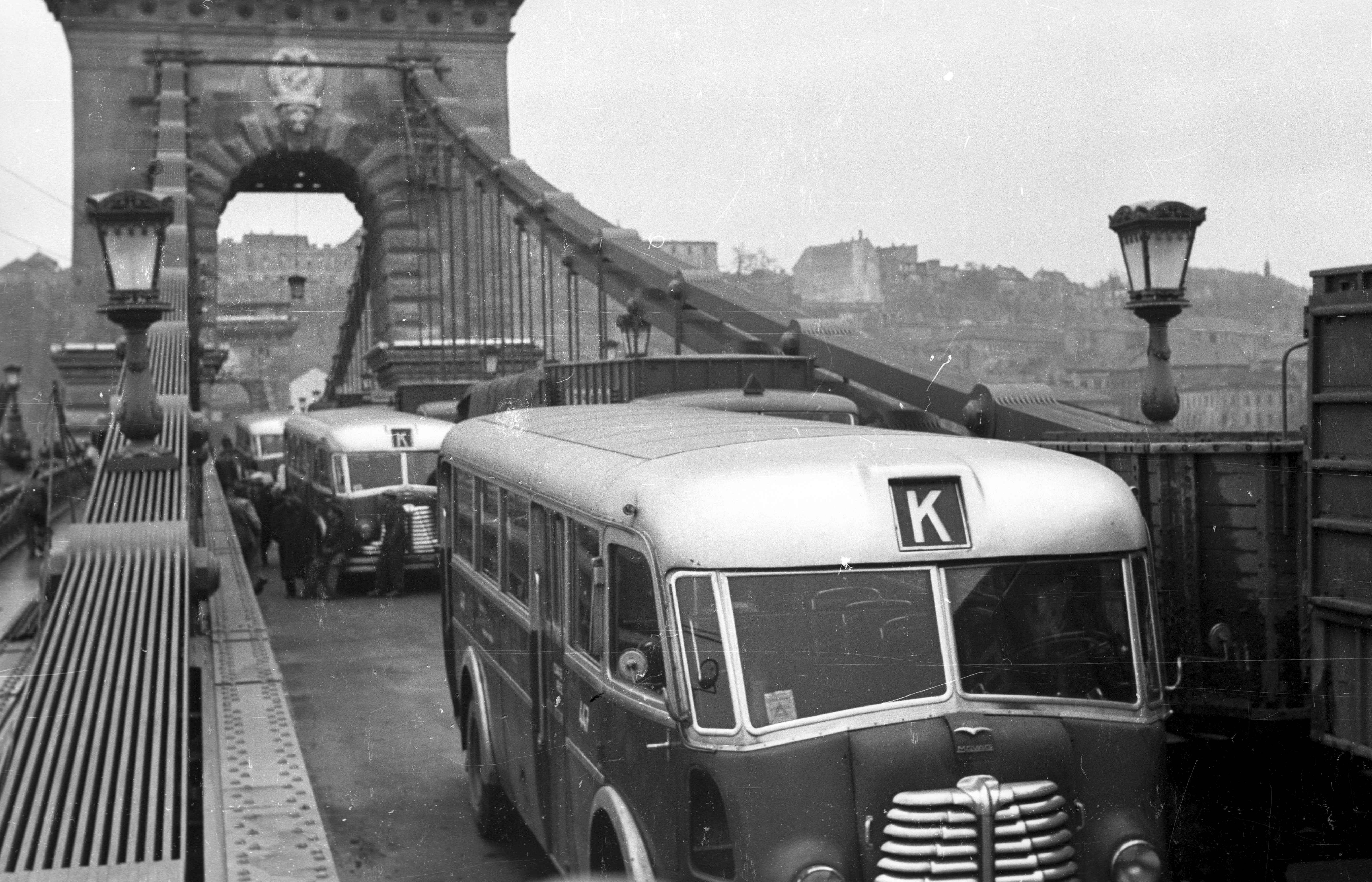 az újjáépített Lánchíd pesti hídfője, terhelési próba. Location: Hungary, Budapest V. Tags: MÁVAG-brand, Hungarian brand, bus, Budapest Title: az újjáépített Lánchíd pesti hídfője, terhelési próba.